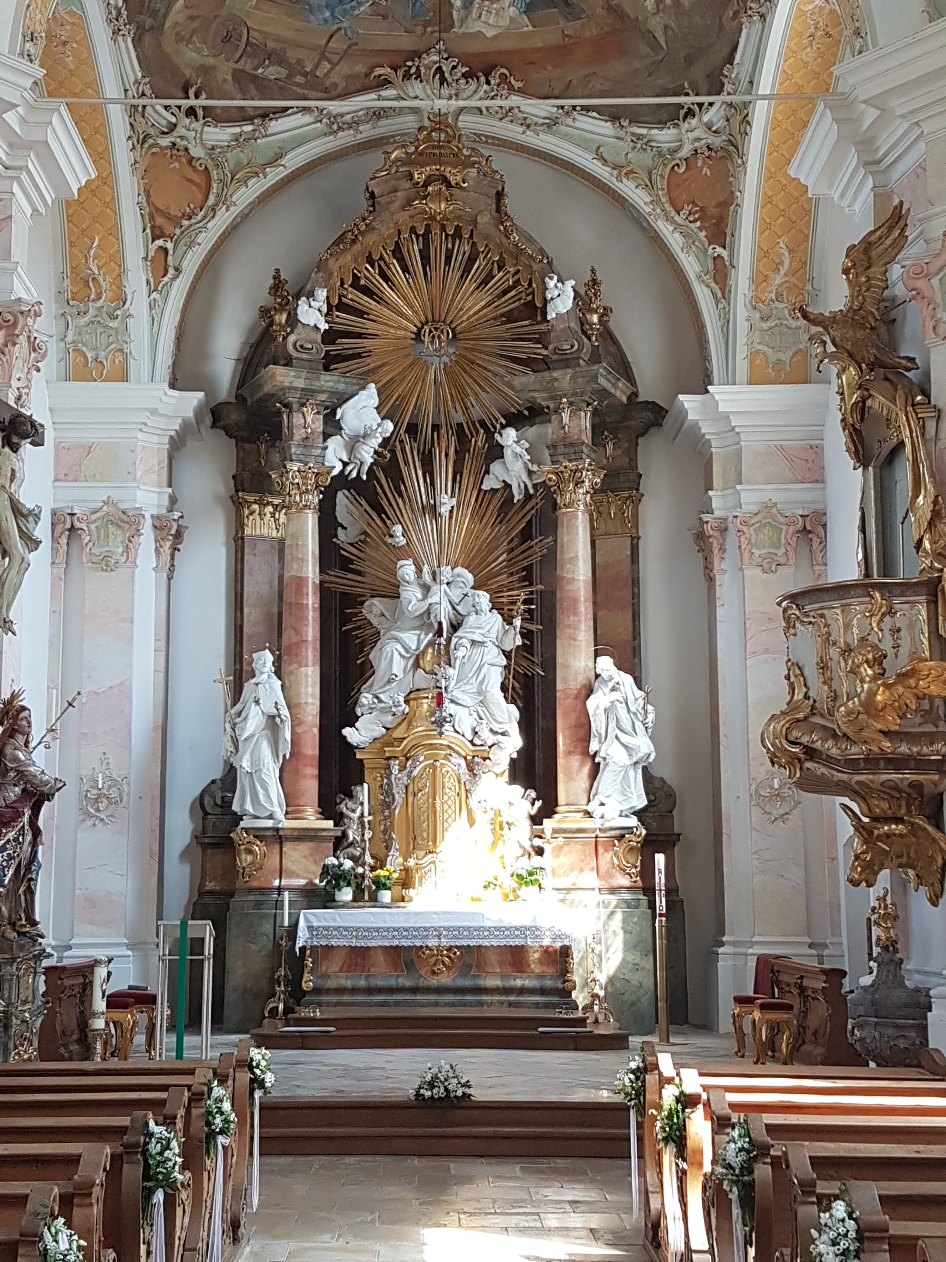 Starnberg, alte Pfarrkirche St. Josef, Hochaltar v. Ignaz Günther.